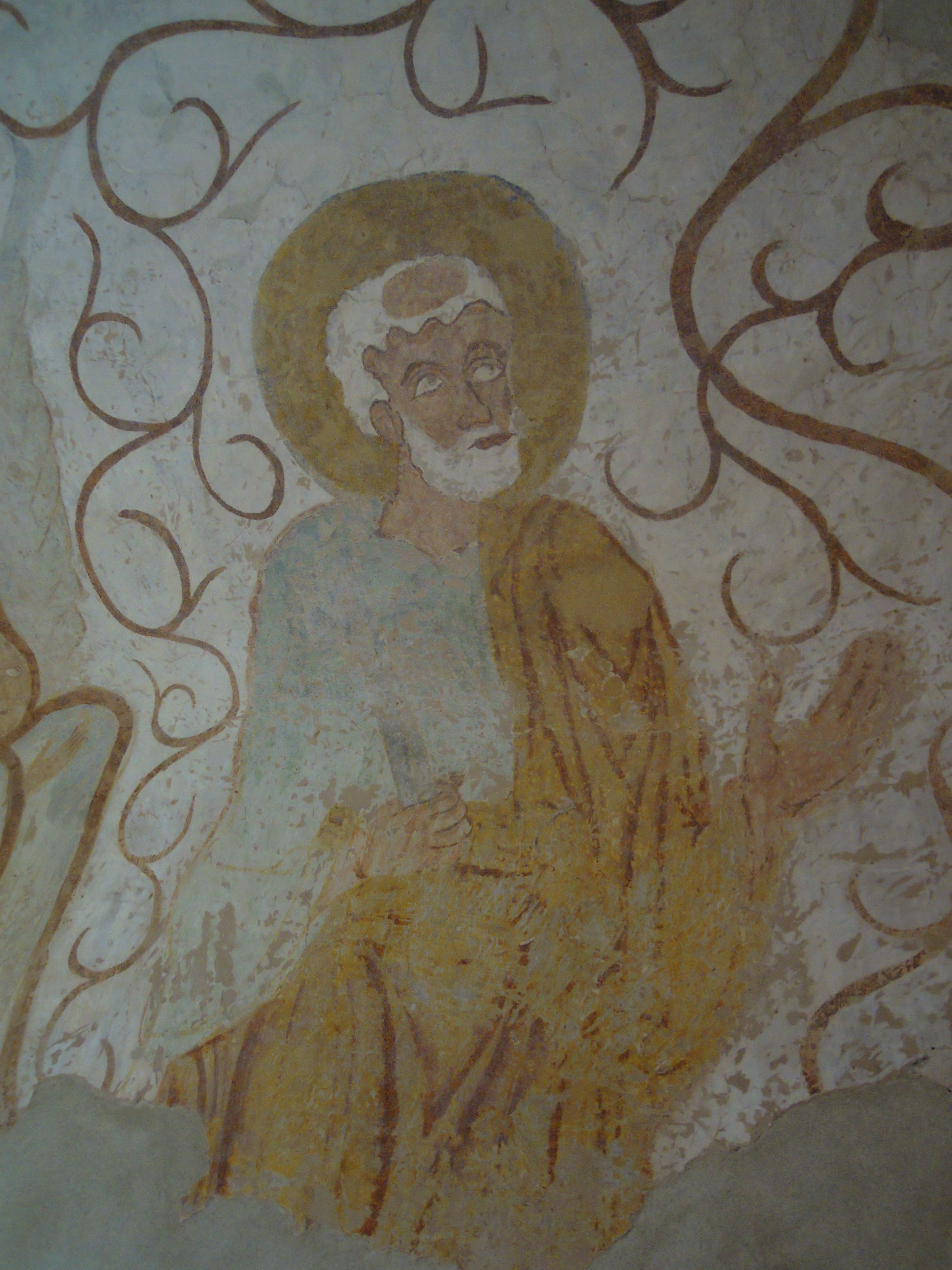 S. Pietro